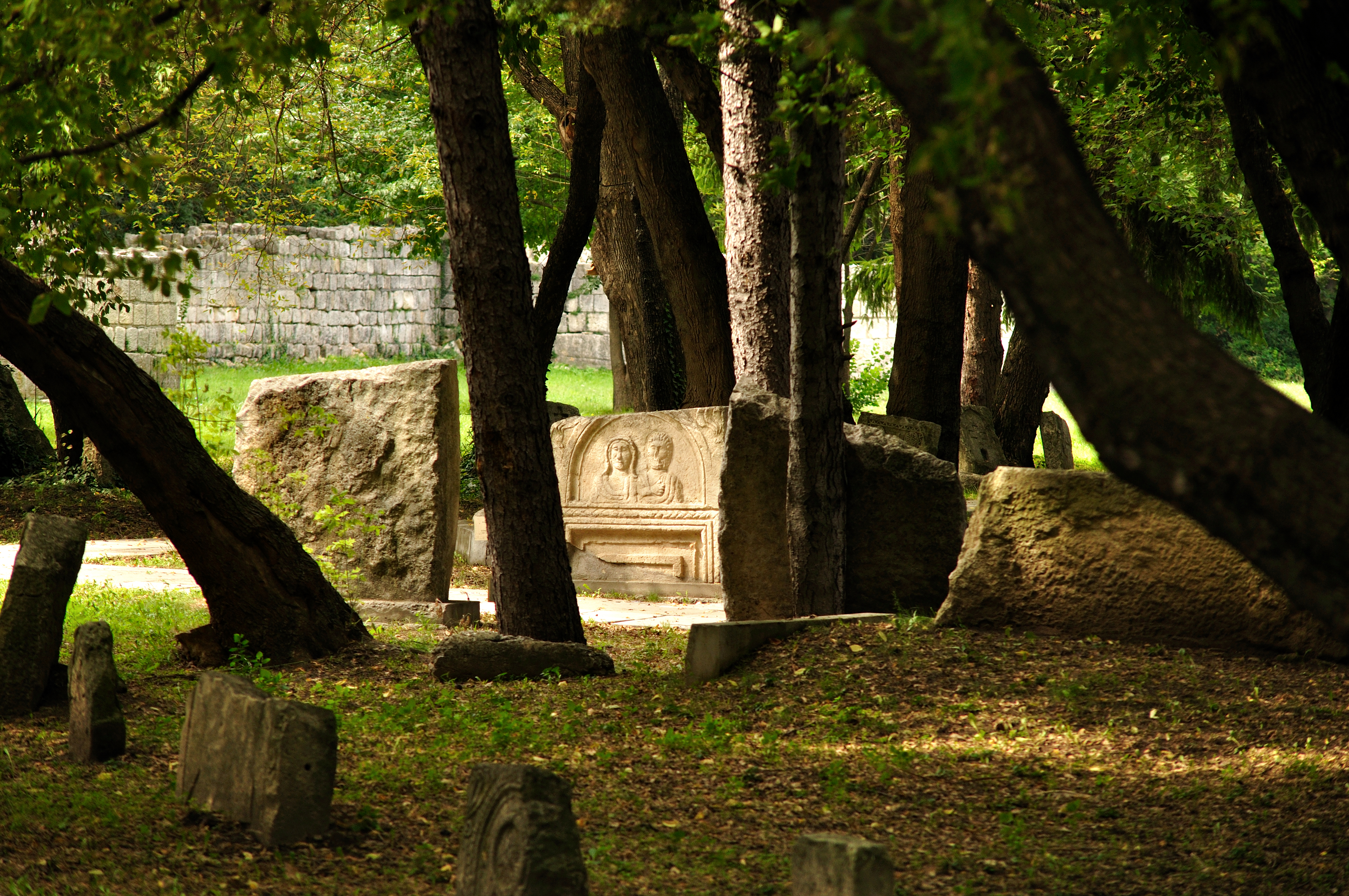 Ето защо на надгробните плочи слагаме снимки. Прототипът е бил потрети върху камък. Яко. Here is why we put photos on our gravestones. The prototype was portraits on stone. Cool.